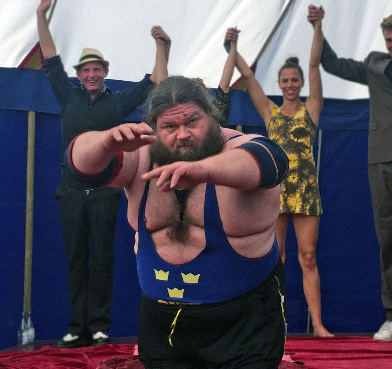 Johnny Wahlqvist, styrkelyftare född 1973, uppträder 2016 på Kiviks Marknad i Varieté Meduza